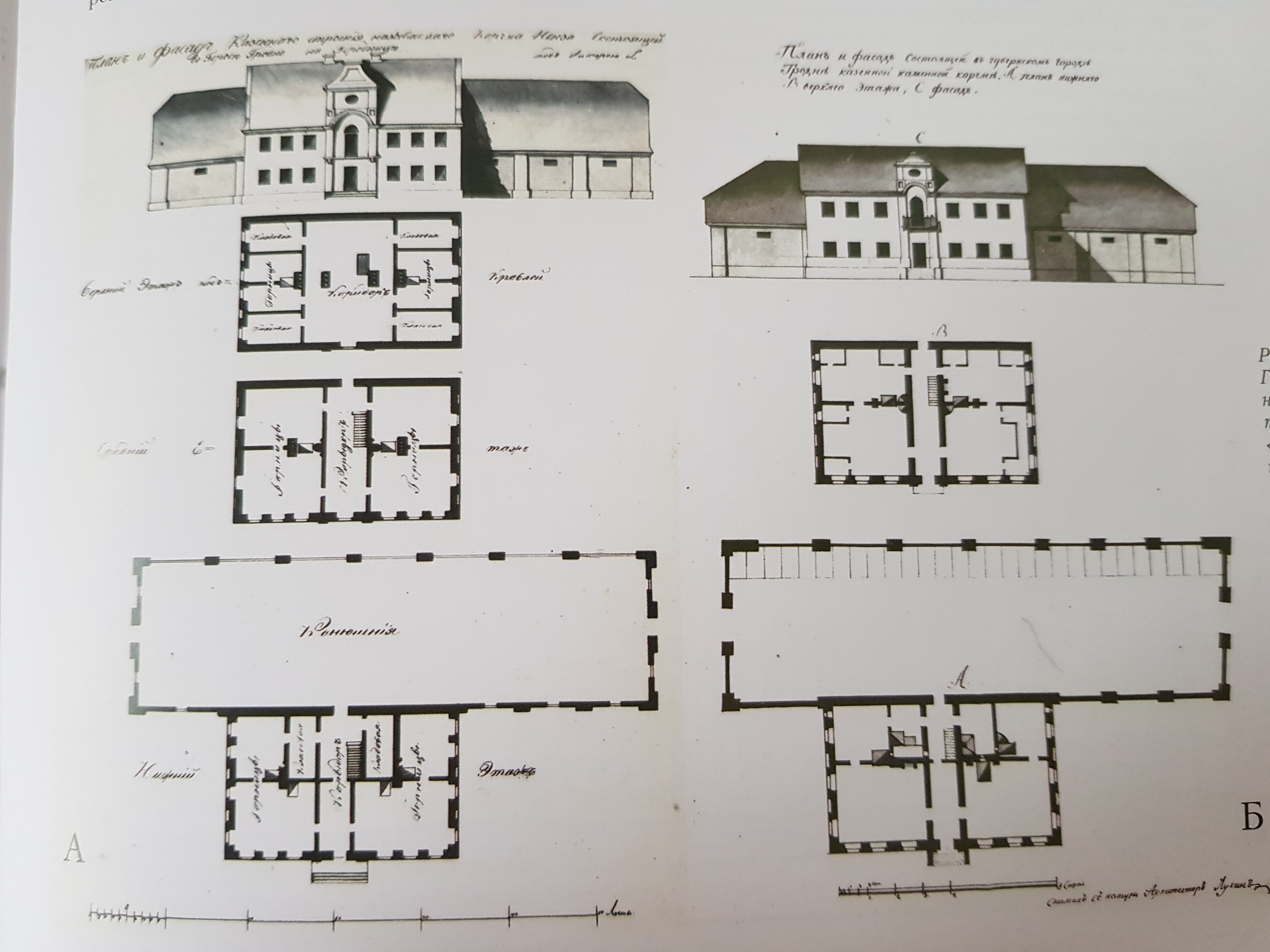 Карчма "Ненза". Гарадніца. А - галоўны фасад і планы трох паверхаў карчмы "Ненза". Паказана на плане Гродна 1780 года як казённы заезд, а таксама на плане 1795 года. Фіксацыйныя чарцяжы падпісаў губернскі архітэктар Багеміль (РДГА, ф. 1488, воп. 1, спр. 951). Б - галоўны фасад і планы двух паверхаў карчмы "Ненза" пасля перабудовы. На чарцяжы подпіс: "Здымаў з натуры архітэктар Лукін".